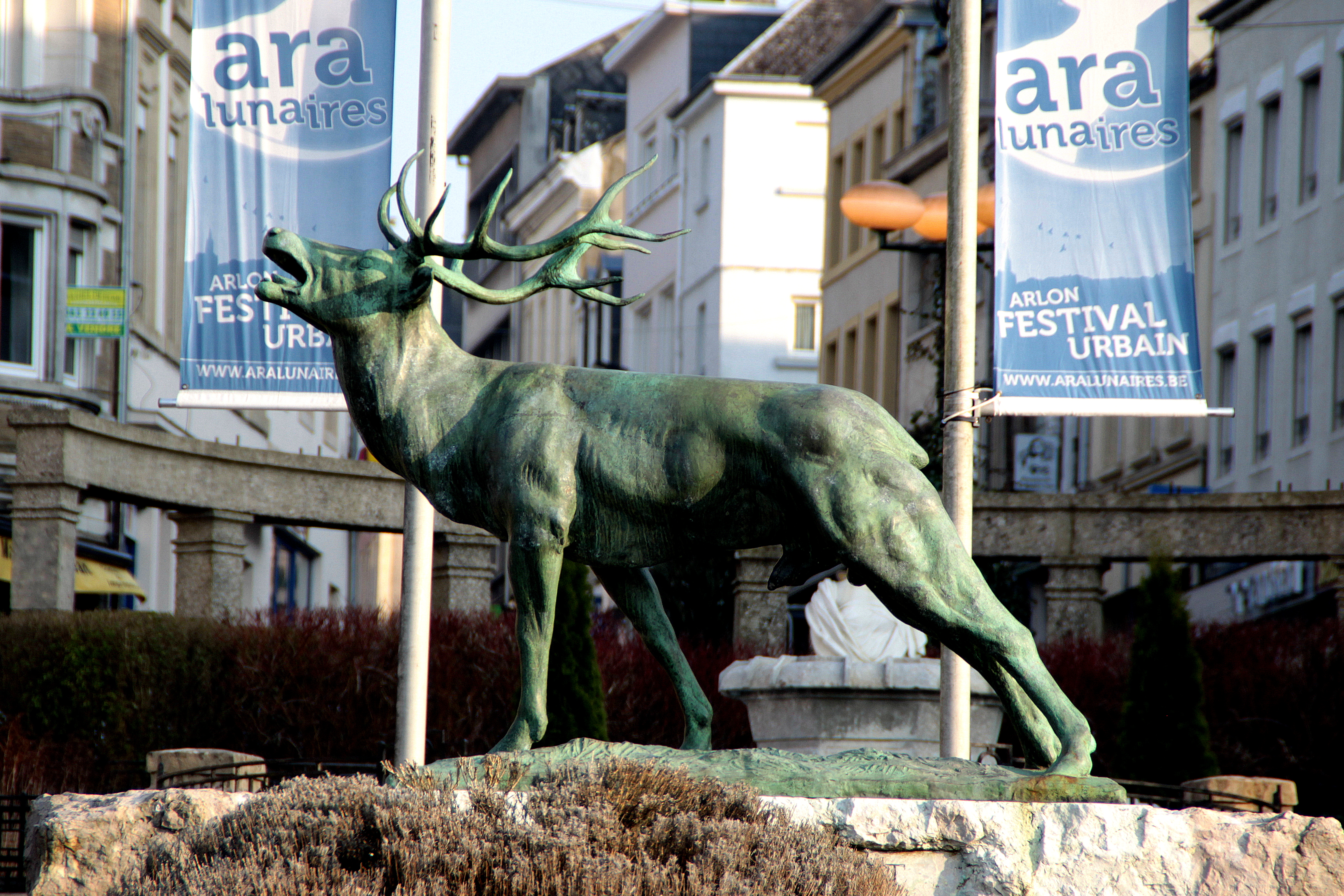 Cette statue de cerf brâmant fut réalisée en bronze par le sculpteur arlonais Jean-Marie Gaspar (1861-1931).